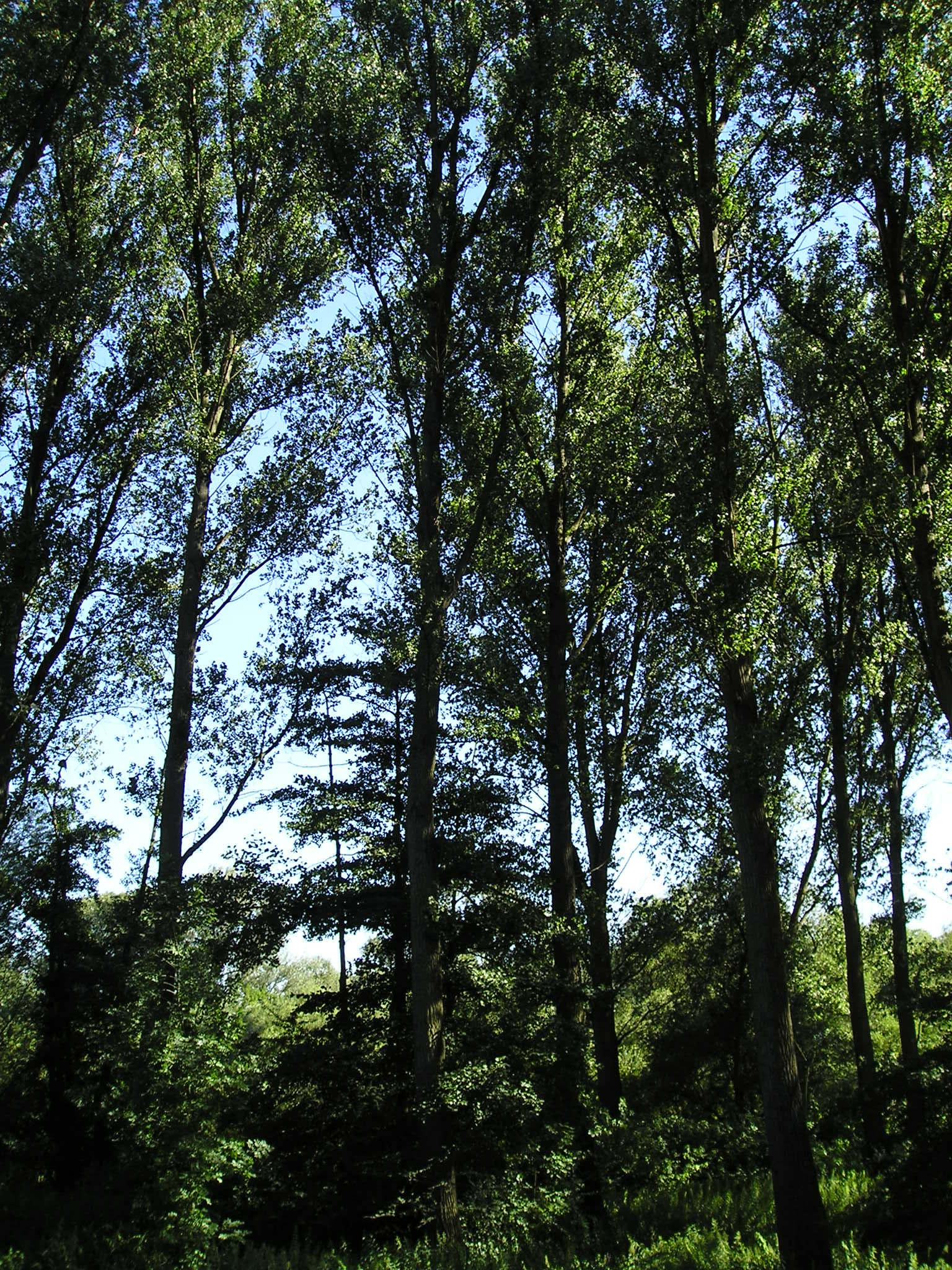 NSG Urdenbacher Kämpen, Düsseldorf, Bäume